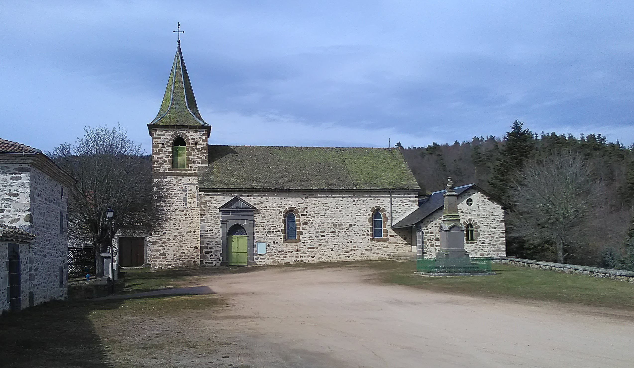 Église de Vabres dans le Cantal.